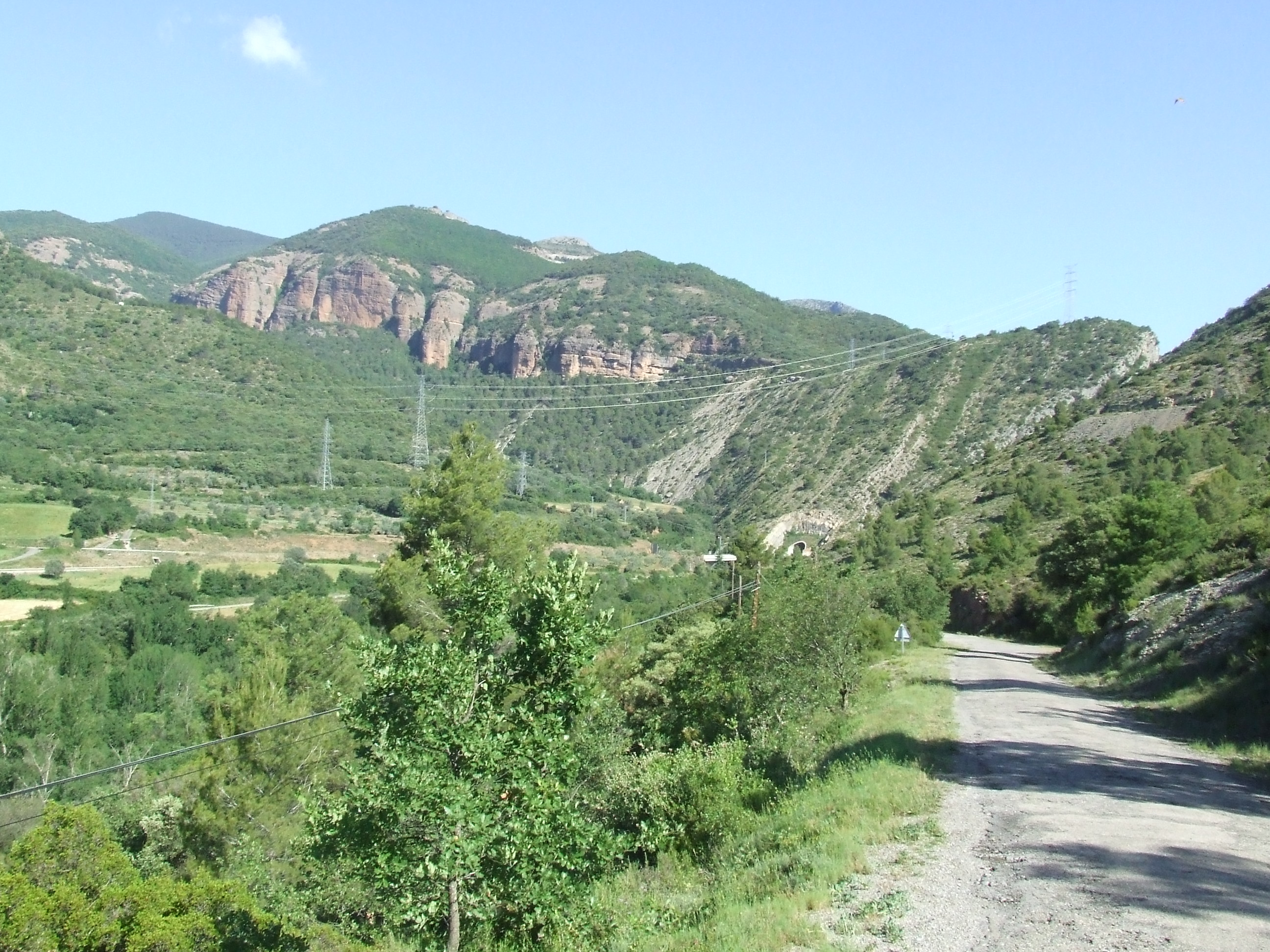 La Taula d'Enserola (Erinyà, Toralla i Serradell, Conca de Dalt, Pallars Jussà)